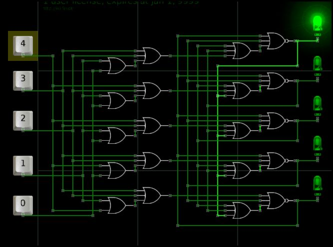 Снимок модели пятибитного RS1S2S3S4-триггера на эквивалентах логических элементов 5ИЛИ-НЕ с пятью устойчивыми состояниями, с индикацией и схемой управления в симуляторе Atanua.